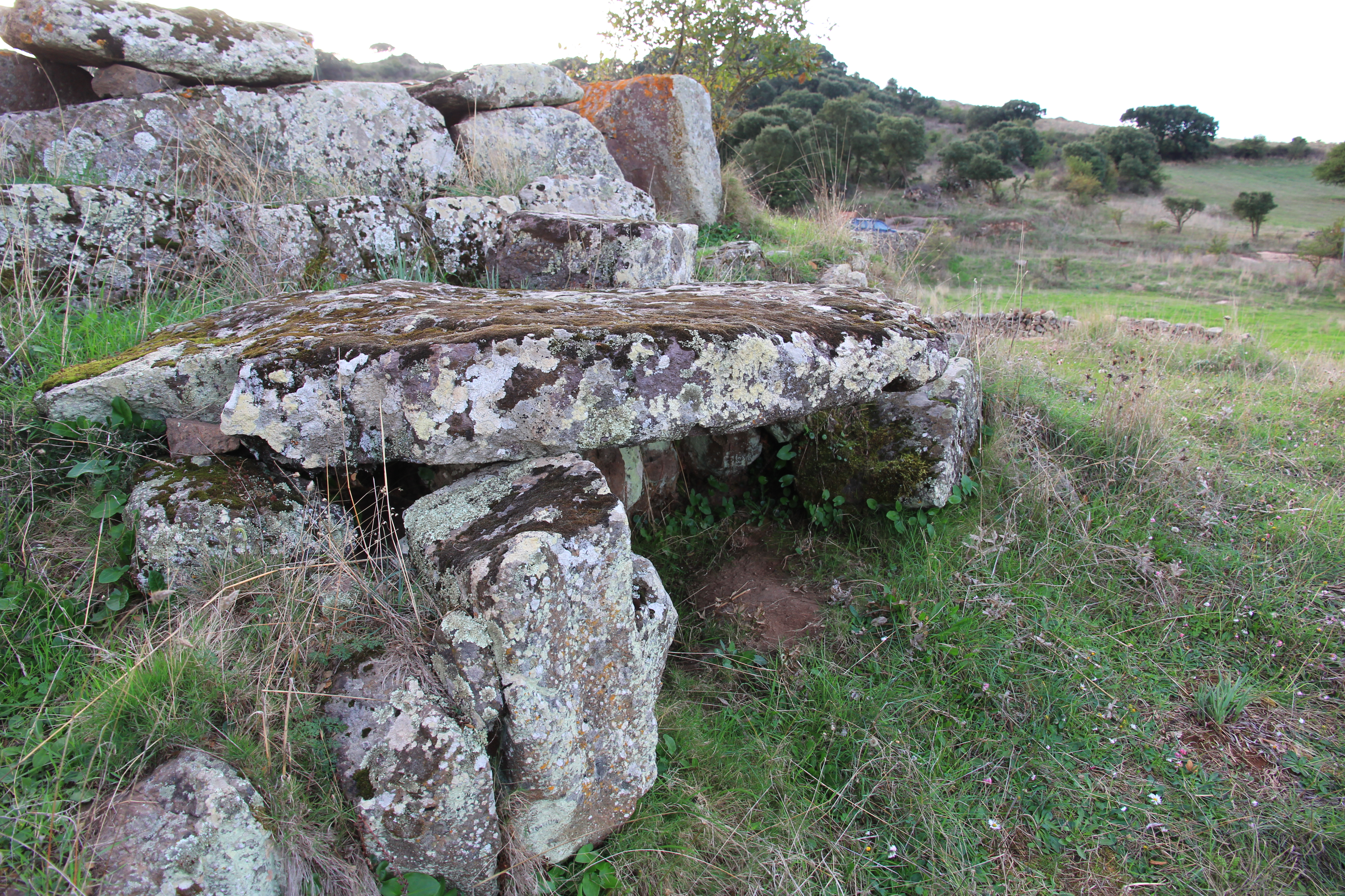 Villanova Monteleone - Tomba dei giganti di Laccaneddu